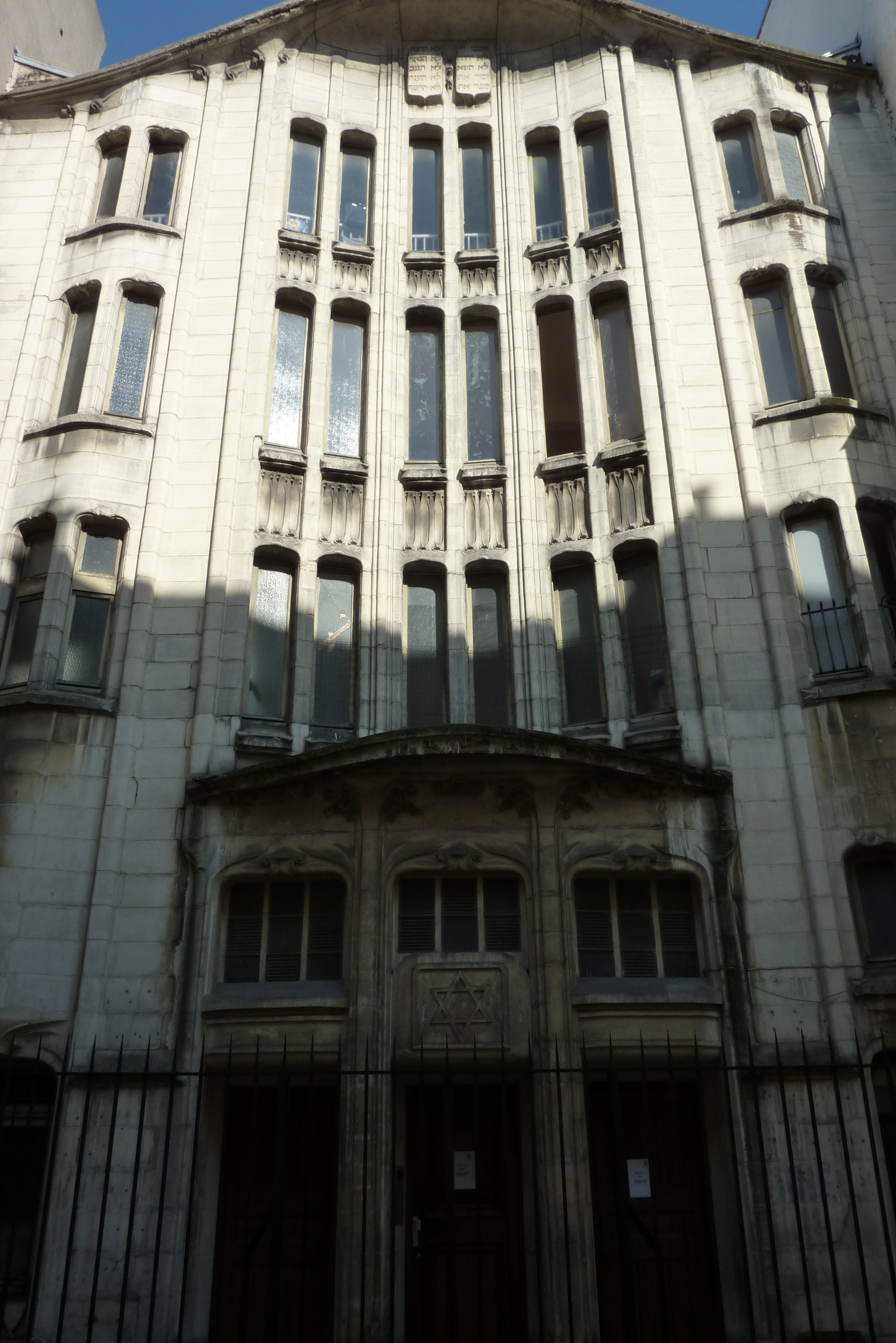 Paris, Synagoge in der Rue Pavée, Fassade